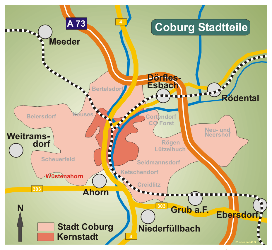 Karte von Coburg, Stadtteil Wüstenahorn